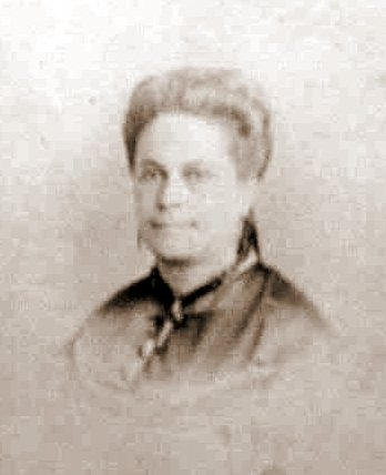 Raquel Agostini - Cantora Lírica - fotografia.